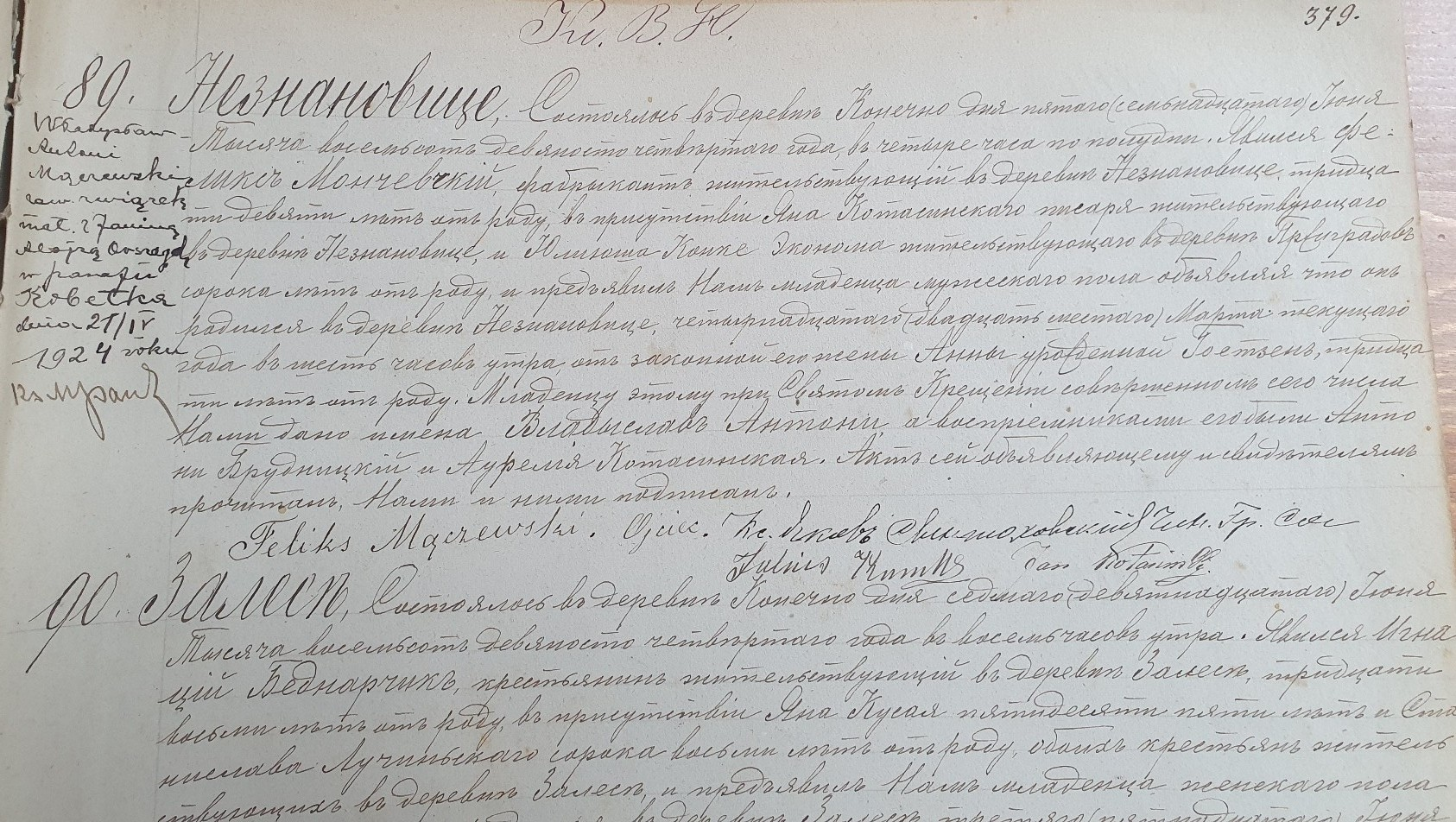 Akt urodzenia, chrztu Władysław Mączewski